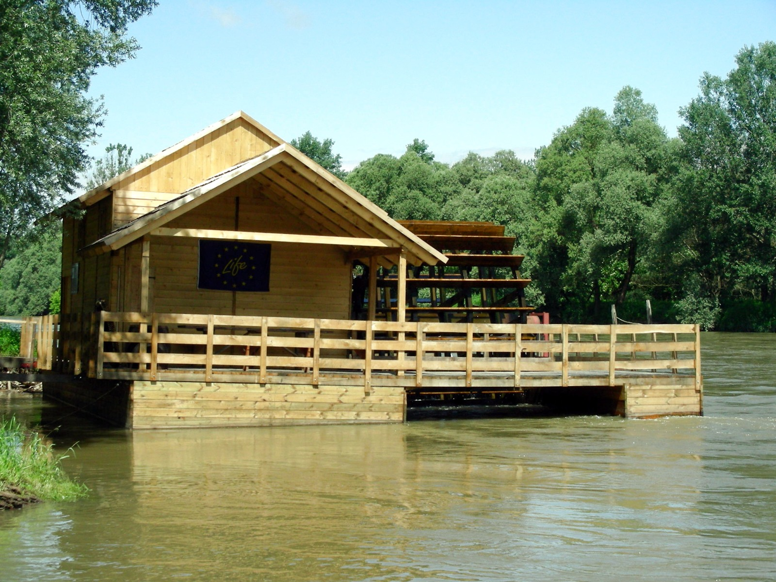 Schiffsmühlen-Nachbau auf der Mur bei Mursco Središče Kroatien